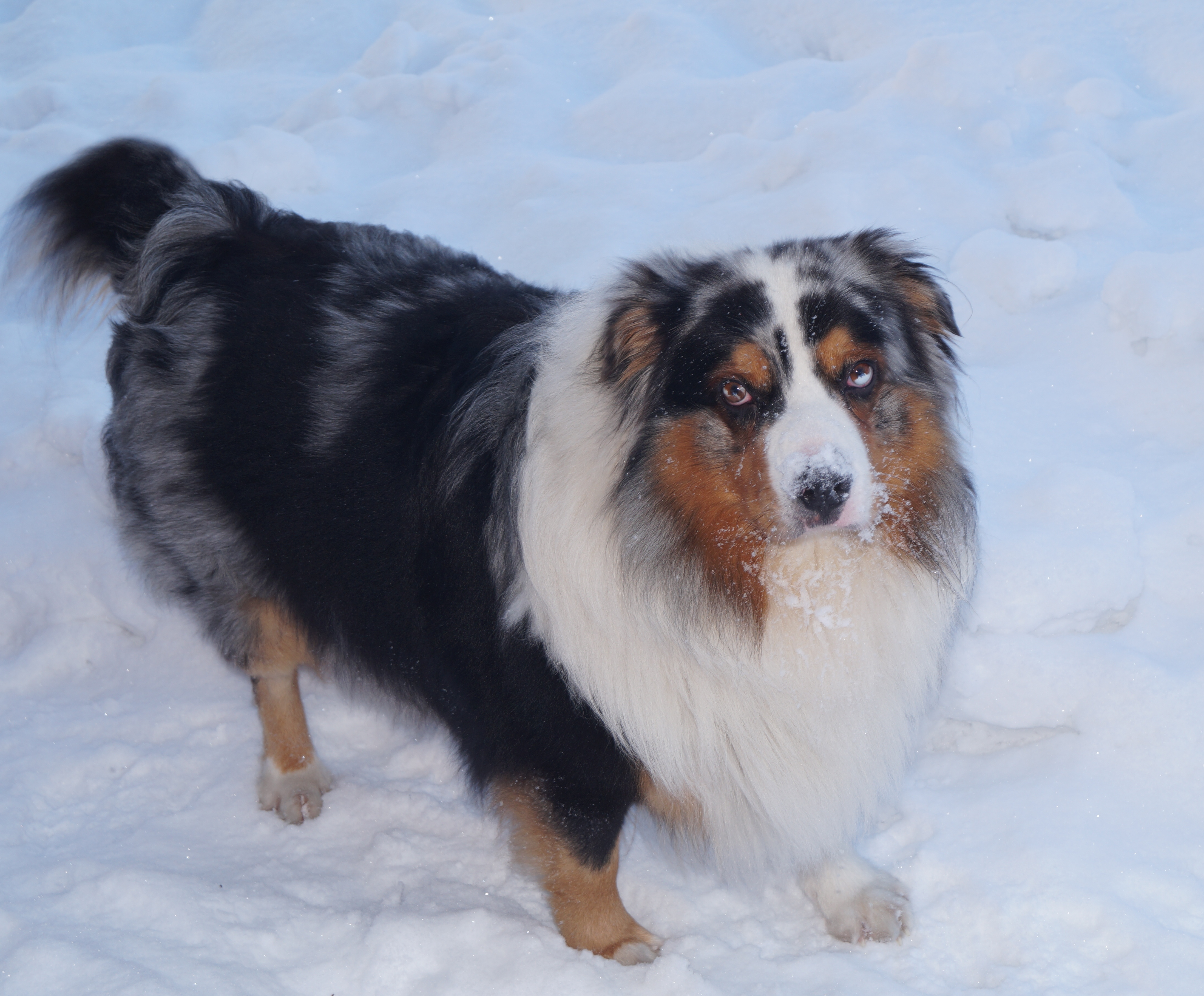 Najczęściej edypalizowane są zwierzęta domowe, w tym szczególnie psy. Na zdjęciu pies pasterski rasy owczarek australijski.